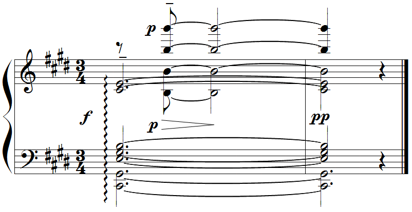 Debussy - Etude X, mes.74-75